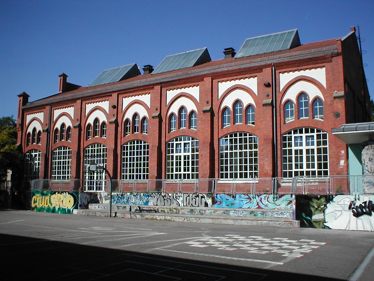 Jugendhaus, Olgastraße in Heilbronn, ehemalige Maschinenfabrik MGH